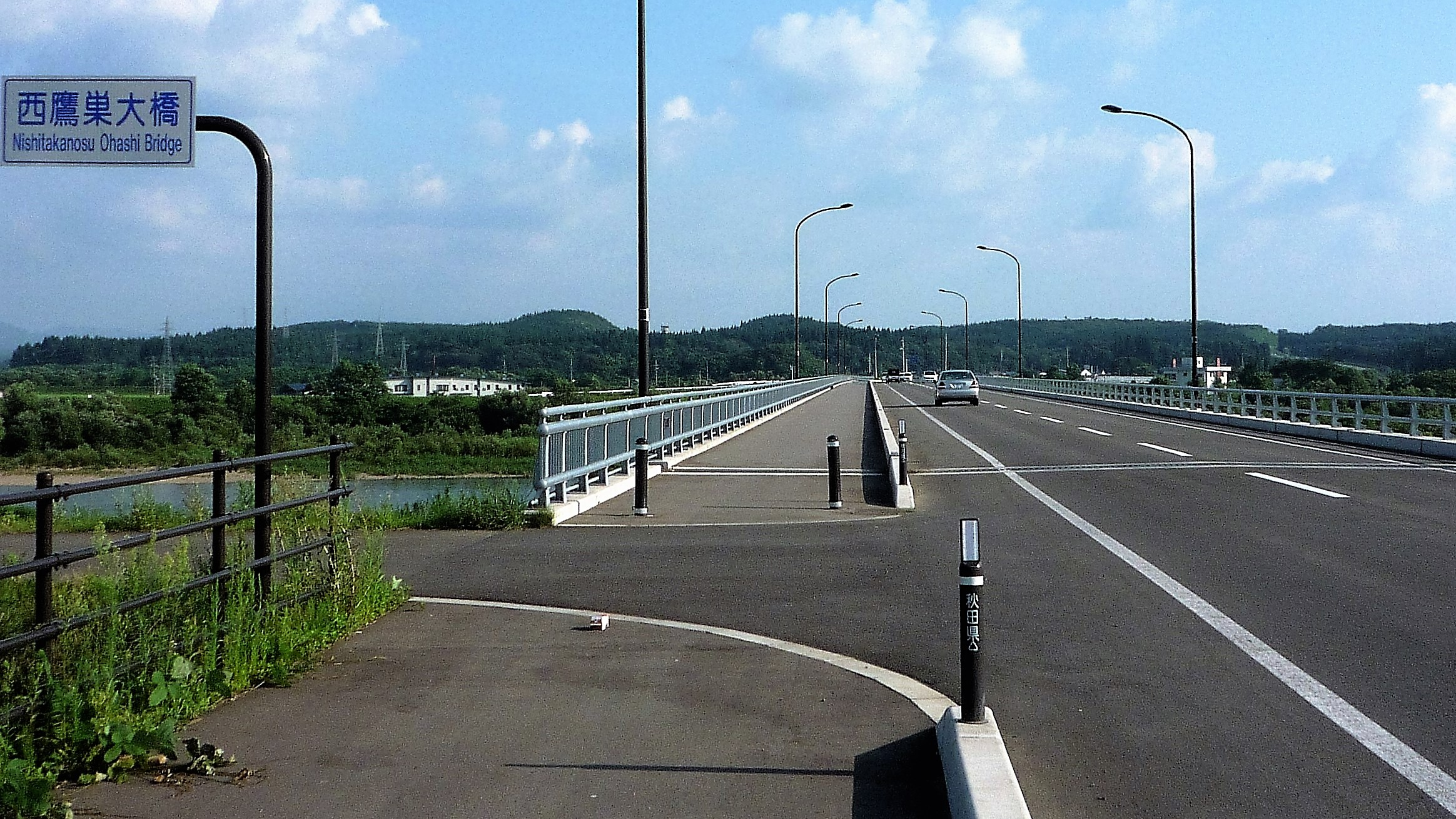 秋田県道24号鷹巣川井堂川線 西鷹巣大橋